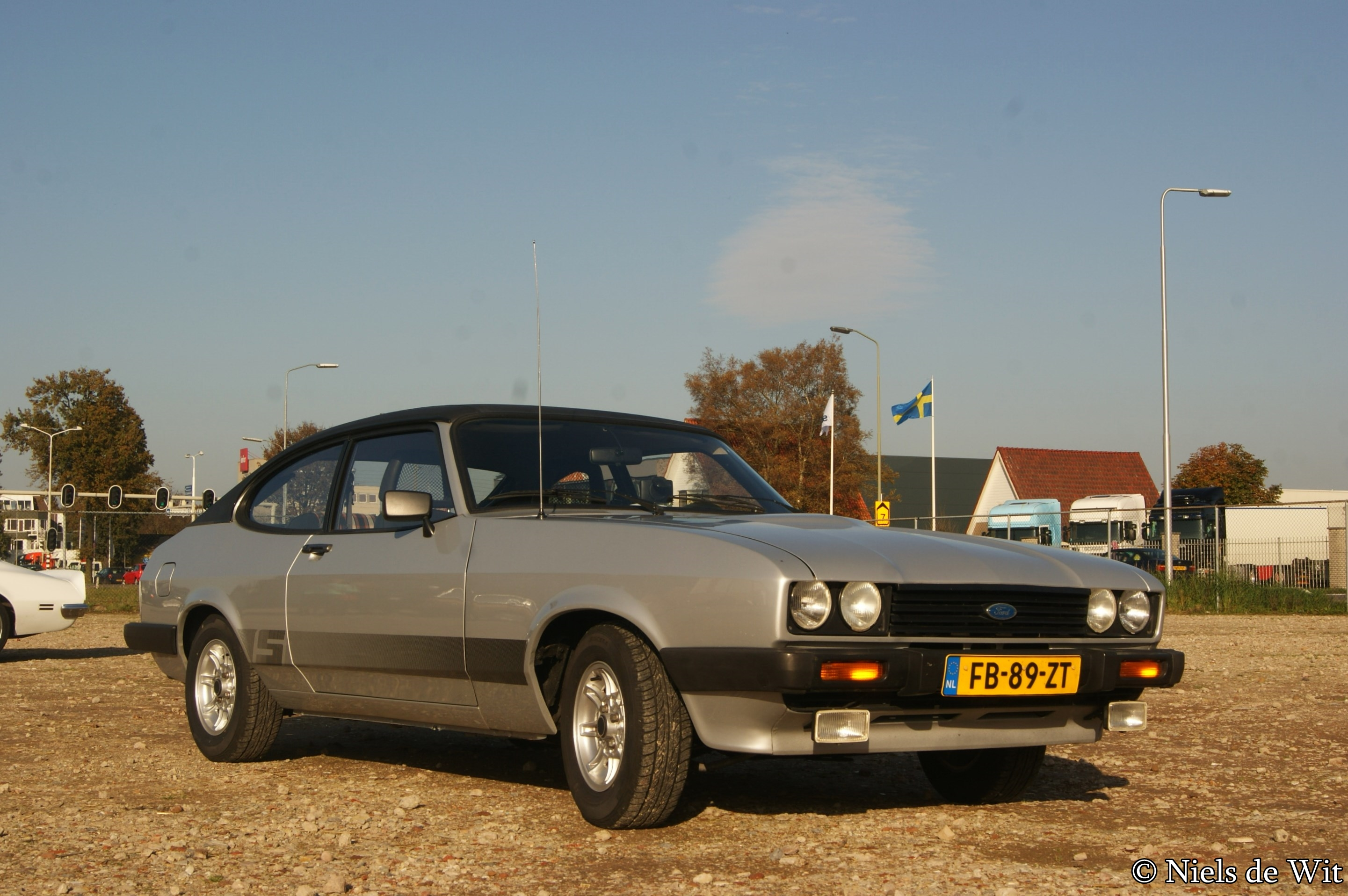 FB-89-ZT Ford Onderdelendag, Barneveld